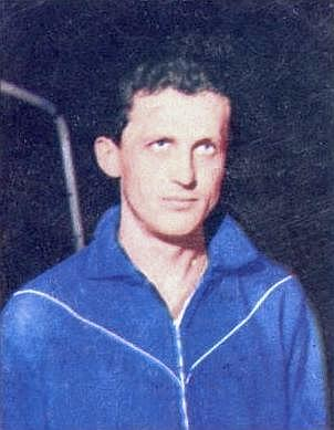 Florian Albert en 1966 - Campioni dello Sport 1966-1967, n°175